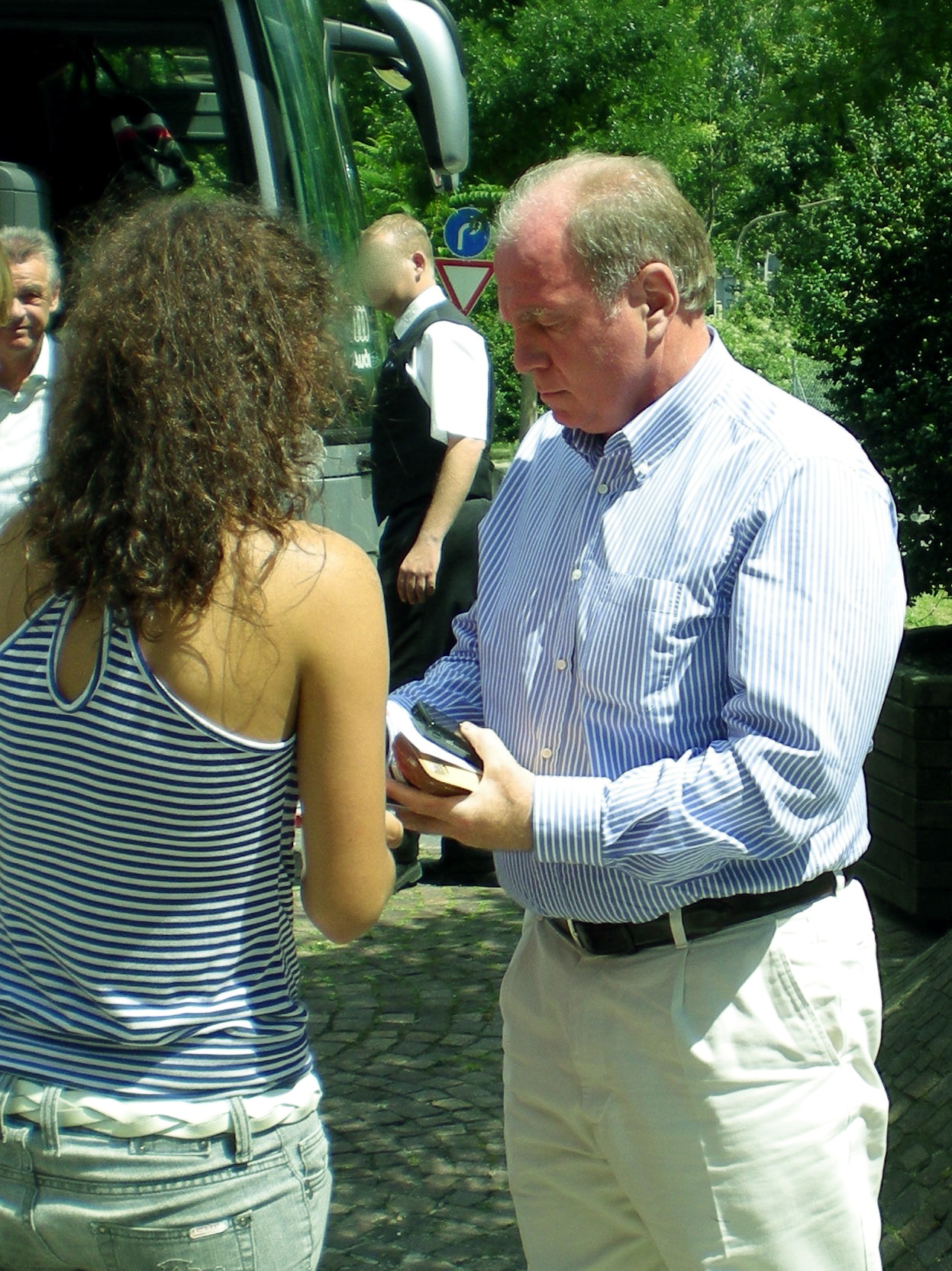 Uli Hoeneß